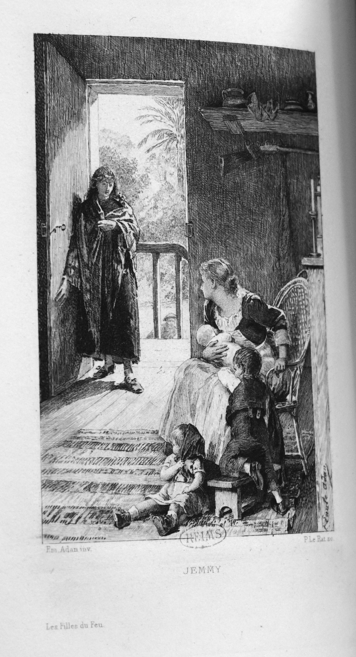 édition illustrée par Adan.